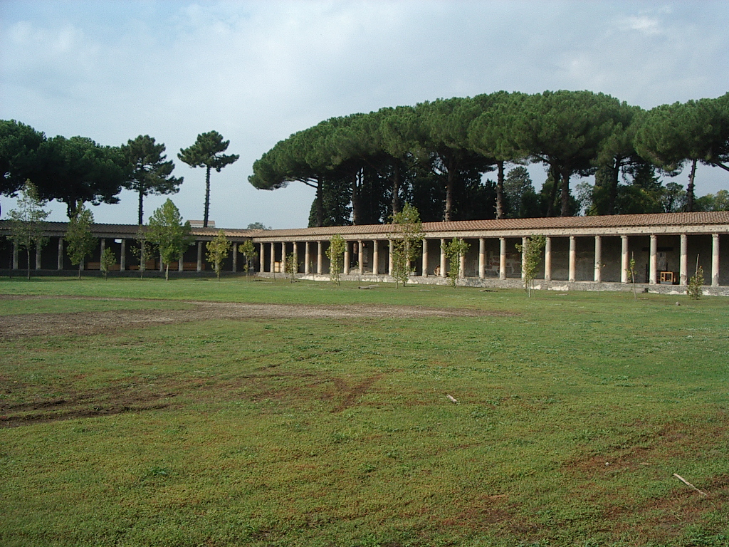 Große Palästra, Pompeji